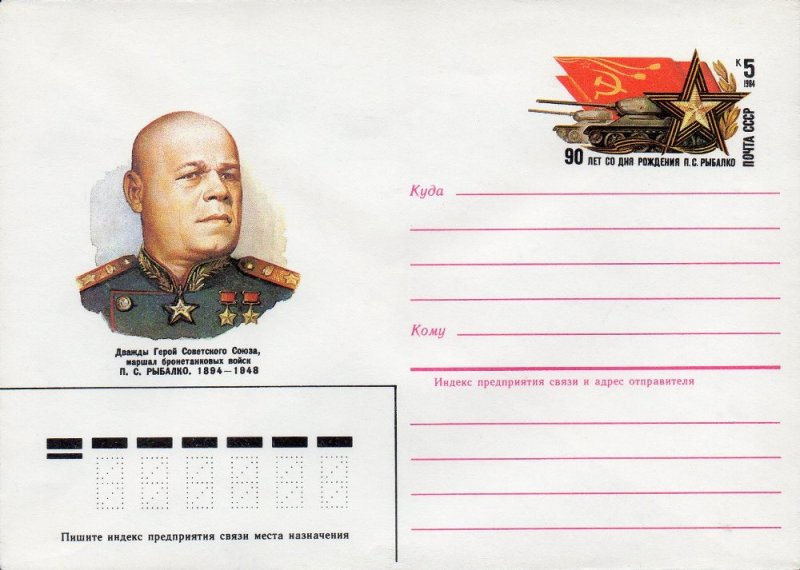 Художественный маркированный конверт с оригинальной маркой, посвящённый 90-летию со дня рождения П. С. Рыбалко. Лицевая сторона конверта